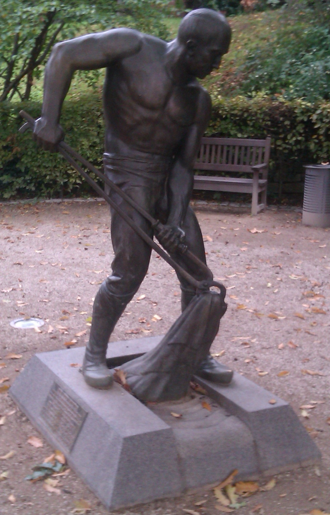 Denkmal des Lederarbeiters von Carl Stock, in Worms